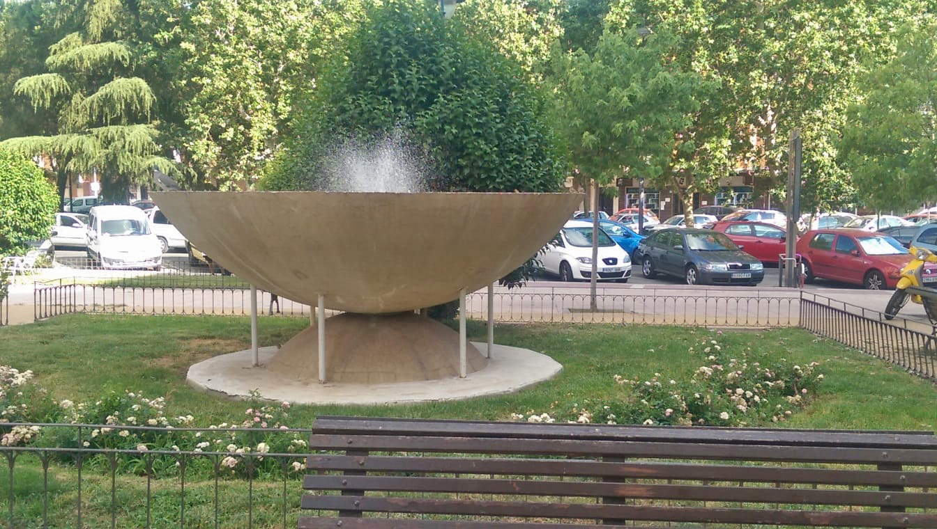 Fuente en forma de cazo parecida a las que llevan la llama olímpica lo único que con agua en vez de fuego ubicada en la plaza Lino Goas